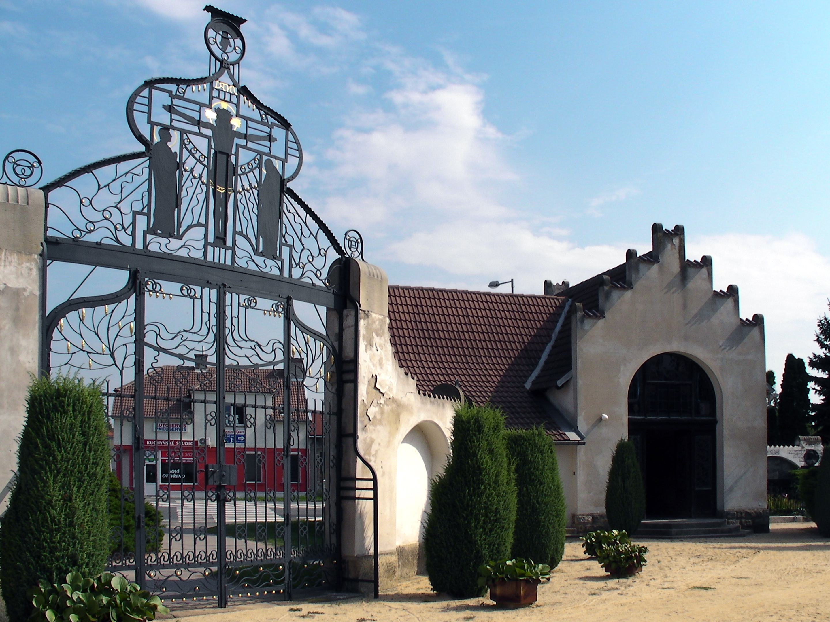 Hřbitov v Kluku. Kaple s márnicí.